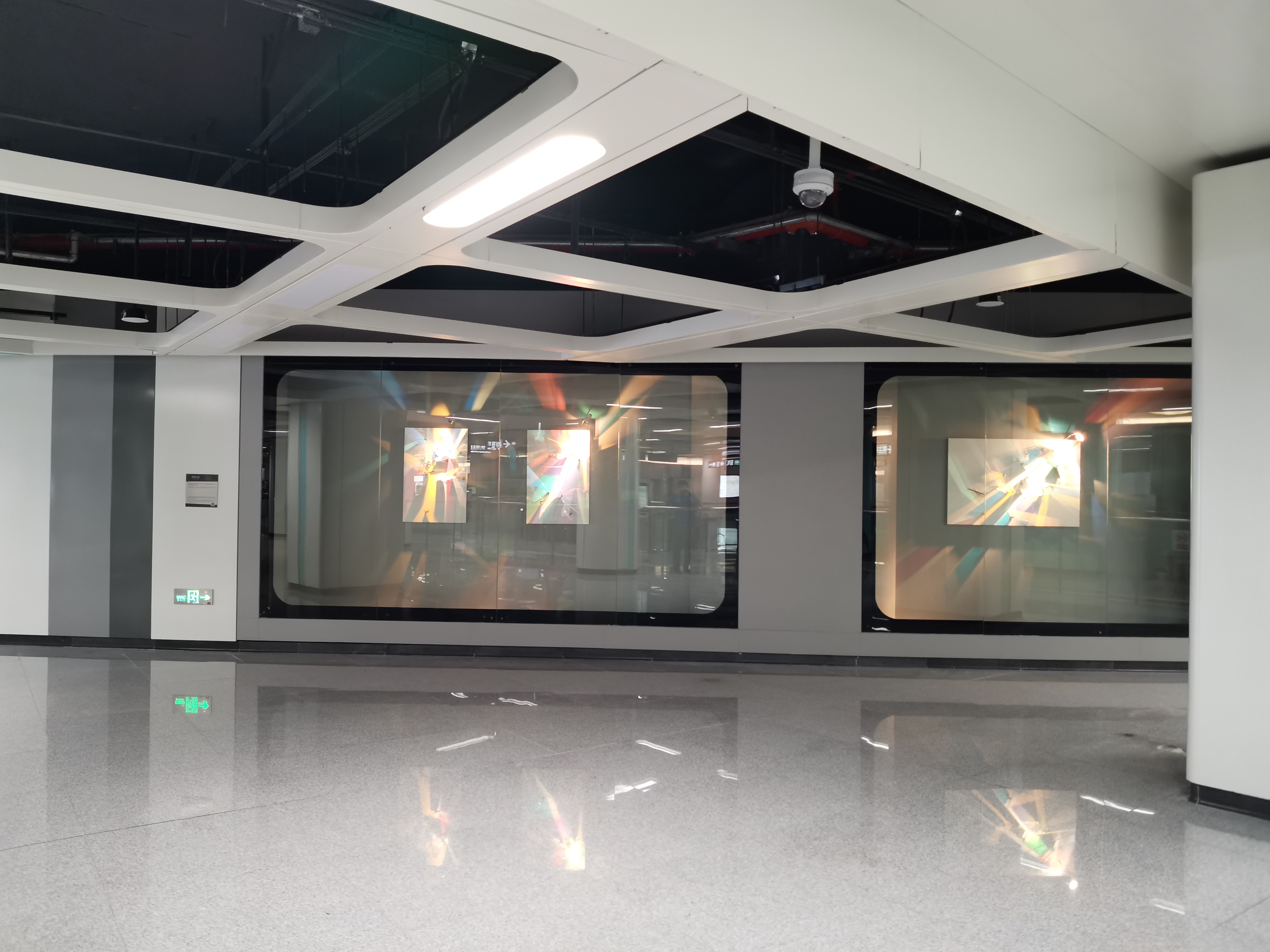 前湾站艺术墙之一，位于五号线站厅区